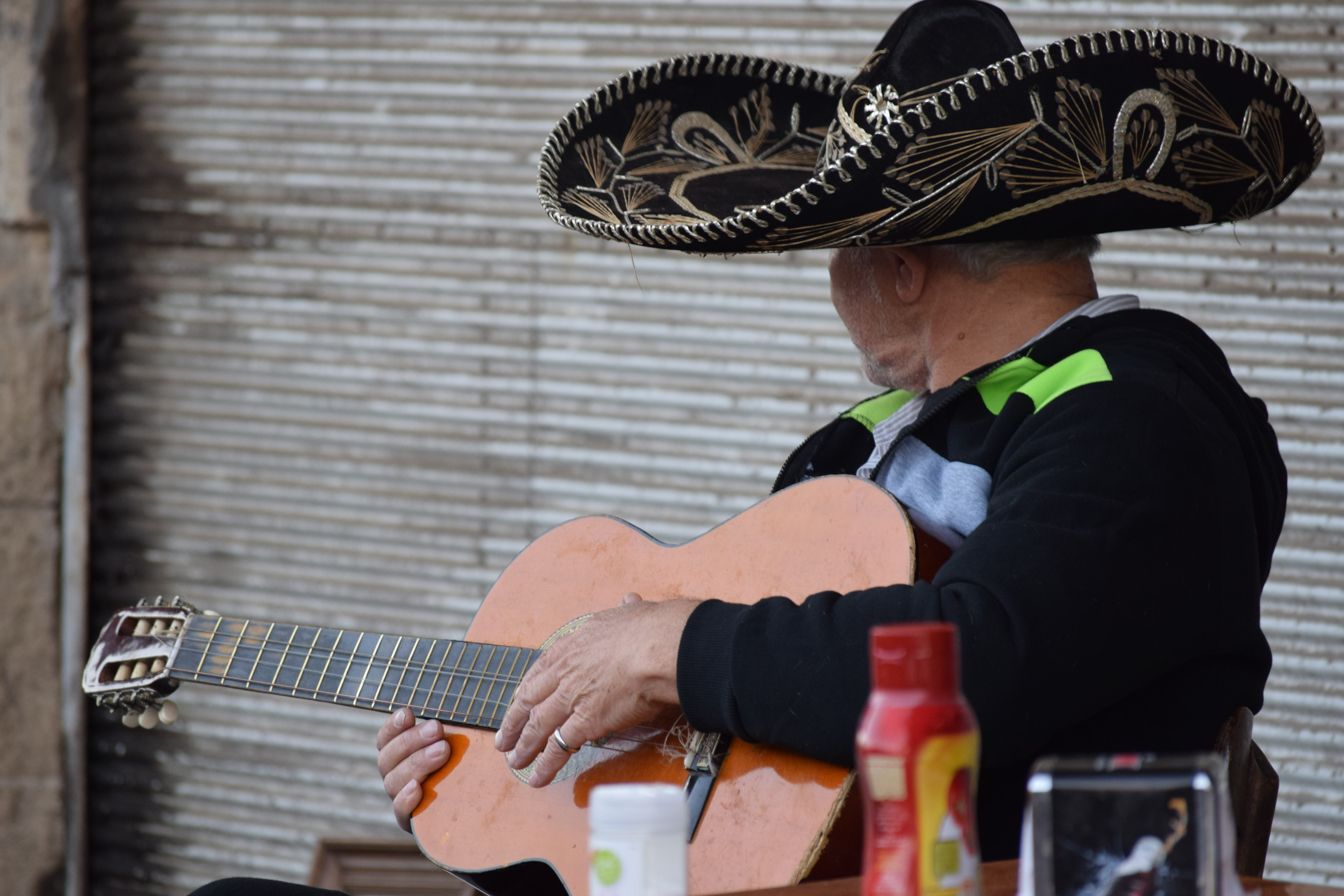 שוק הפשפשים אלון פלורנטין תיכון רוטברג